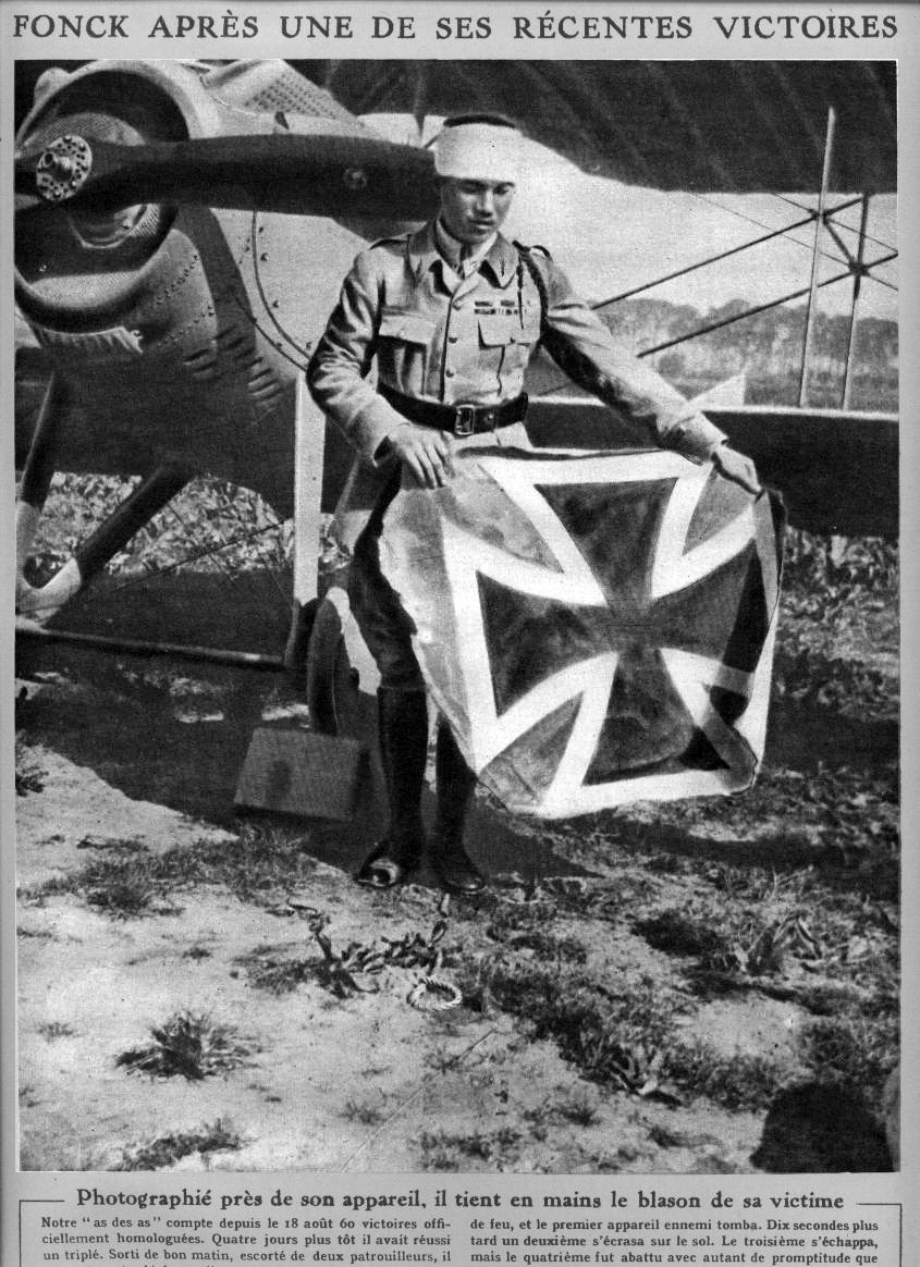 Le pilote français René Fonck après sa 60ème victoire en 1918 à côté de son SPAD.